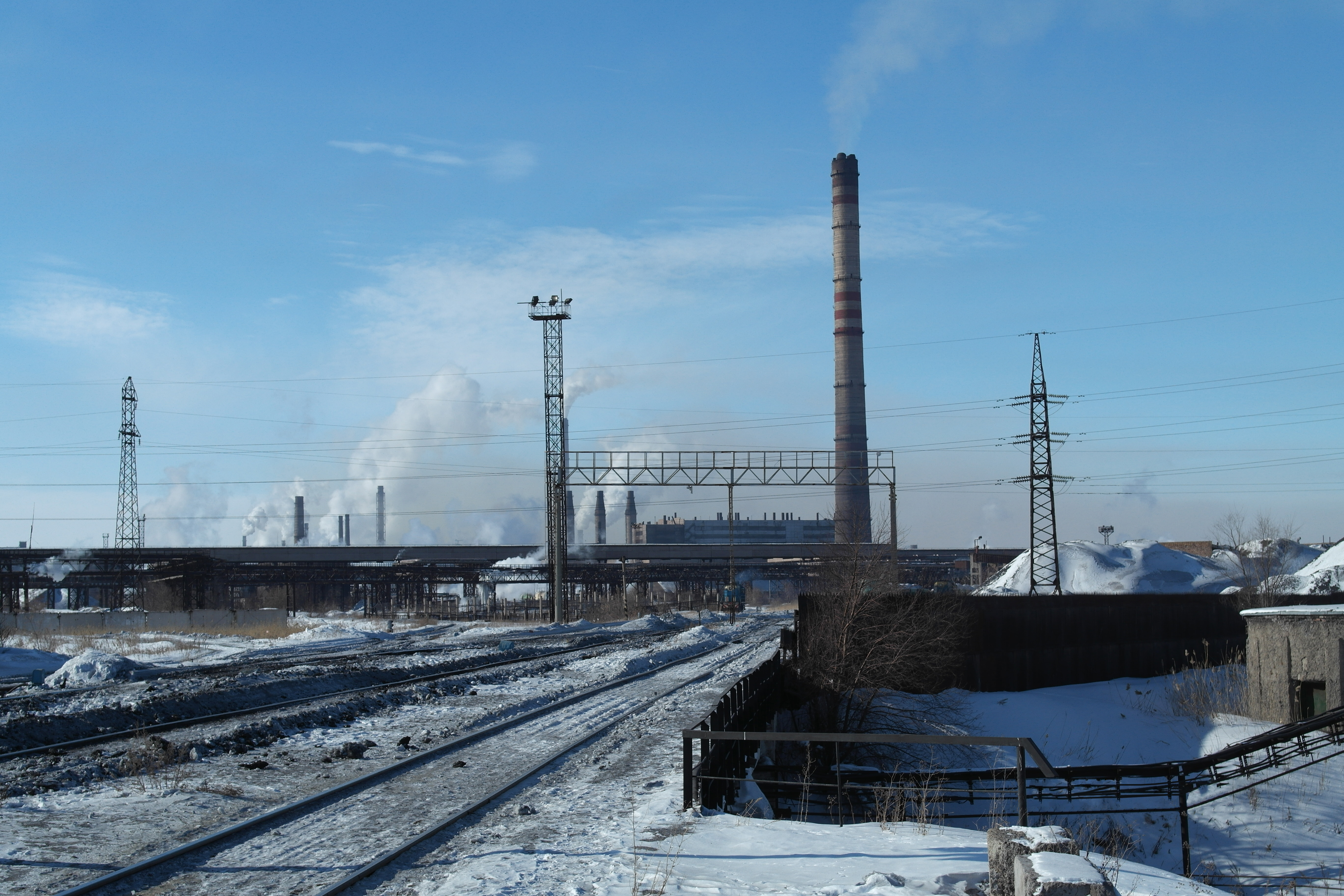 Агломерационное производство Карметкомбината.